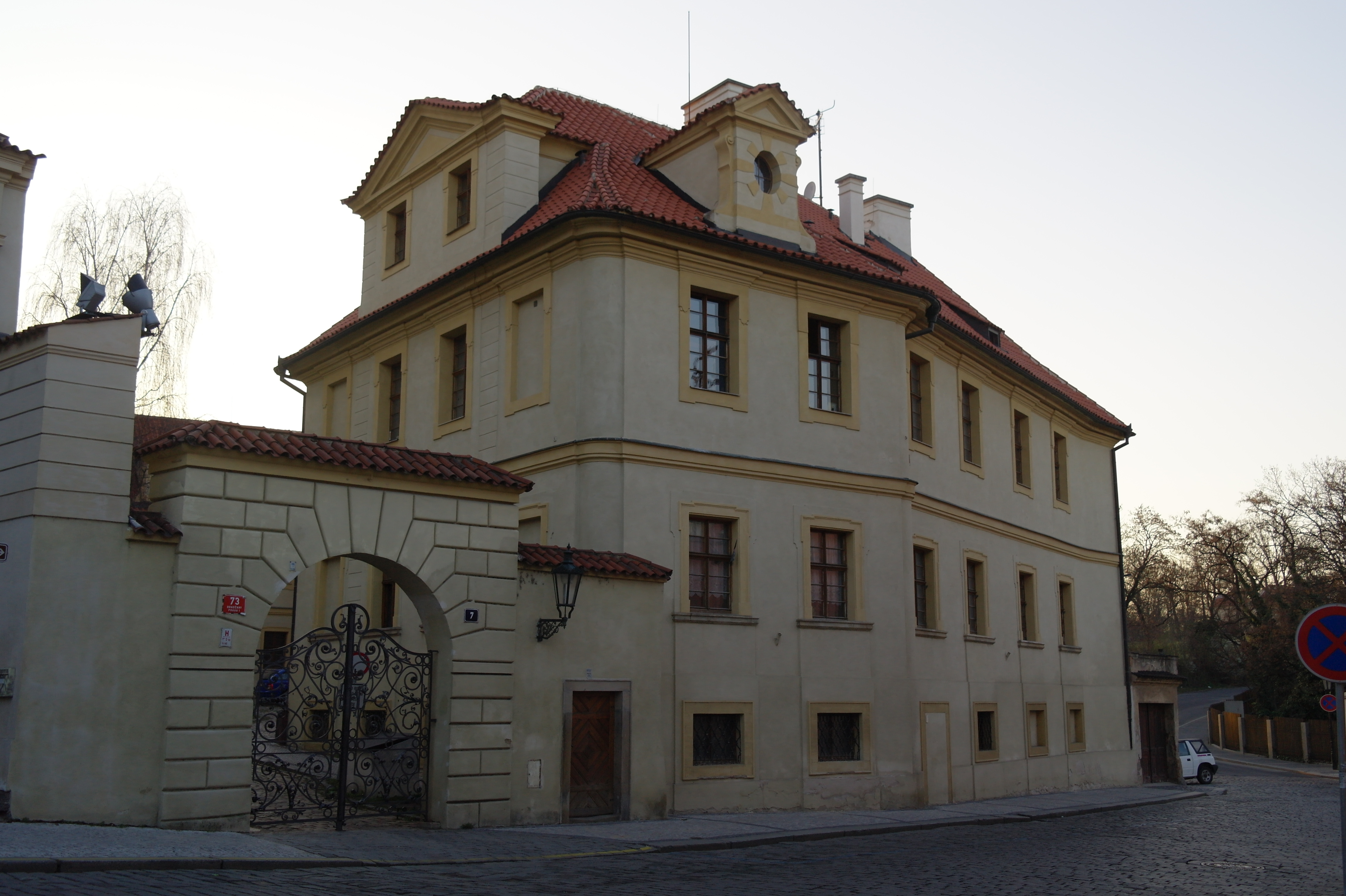 Císařský špitál sv. Antonína v Kanovnické ulici na pražských Hradčanech